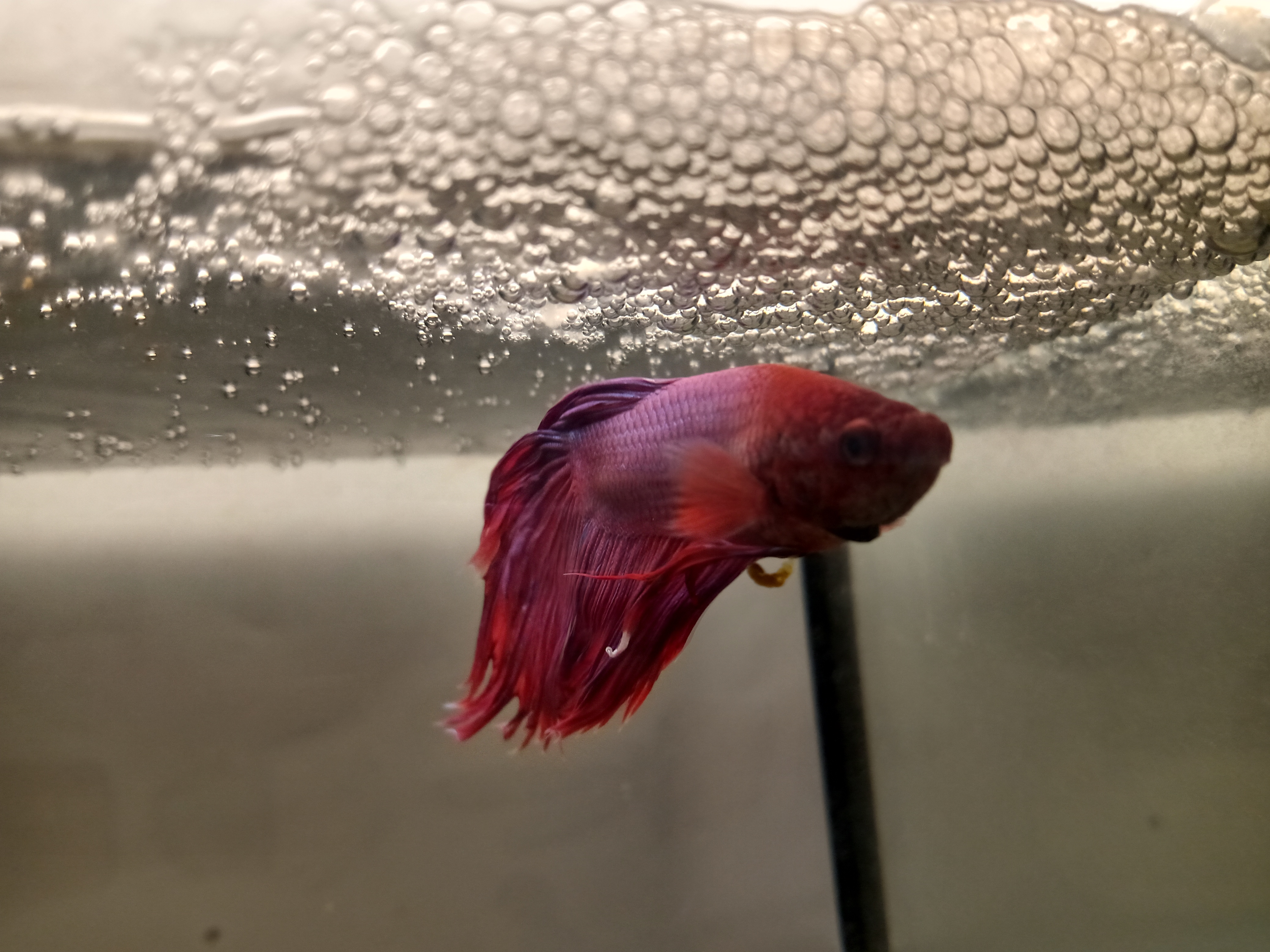 Mascul Betta splendens sub cuibul lui de bule. Exemplar captiv, București.